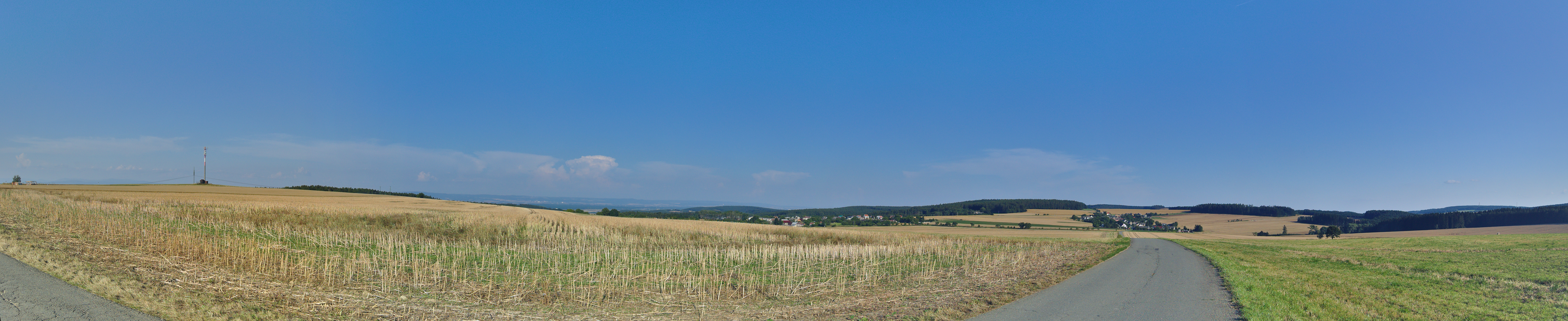 Panoramatický pohled na Slavětín, Ješov a Hanou, okres Olomouc